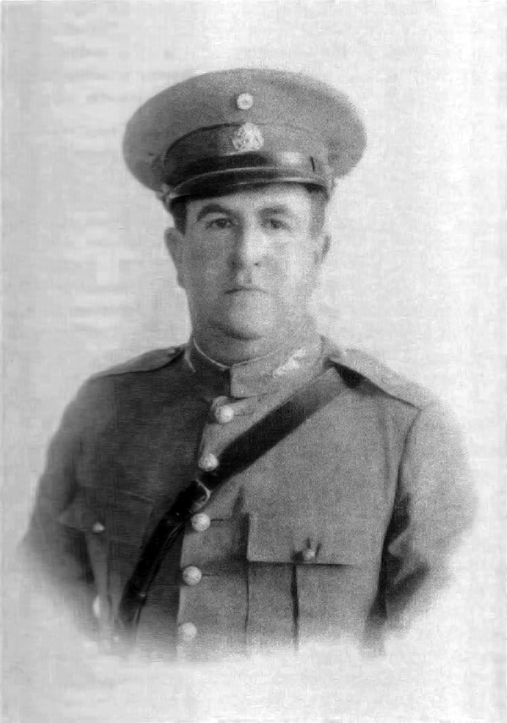 General Manuel Ávila Camacho